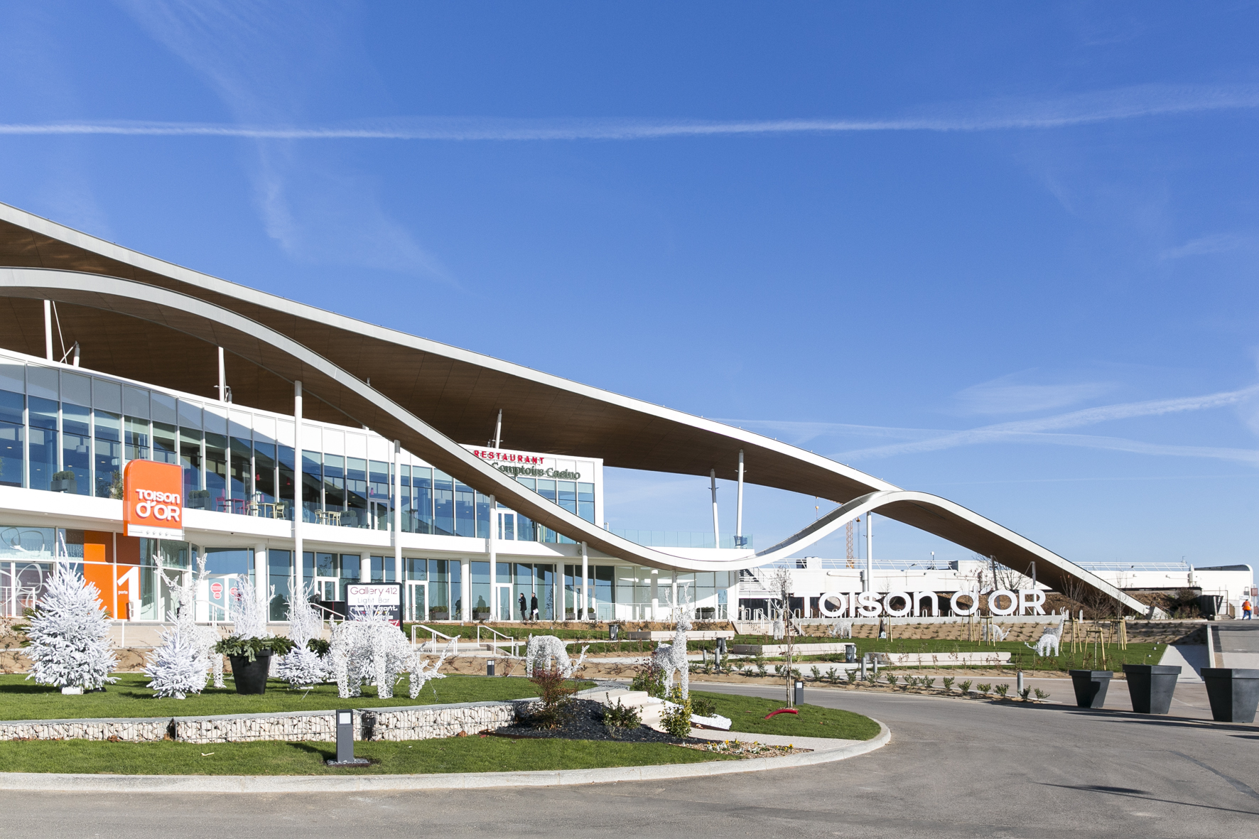 Place Marie de Bourgogne à Noël par Alain Potignon